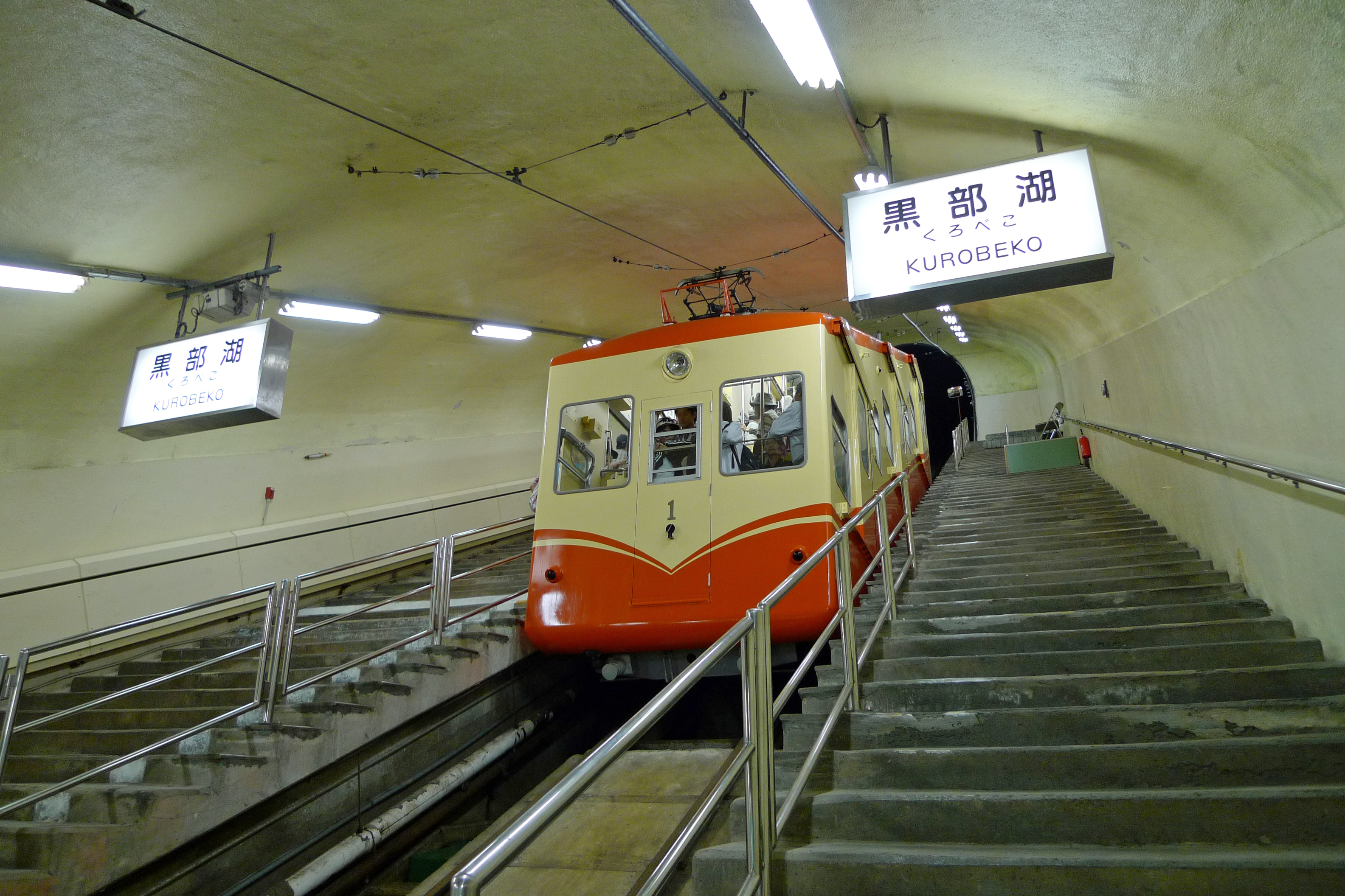 黒部ケーブルカー・黒部湖駅ホーム